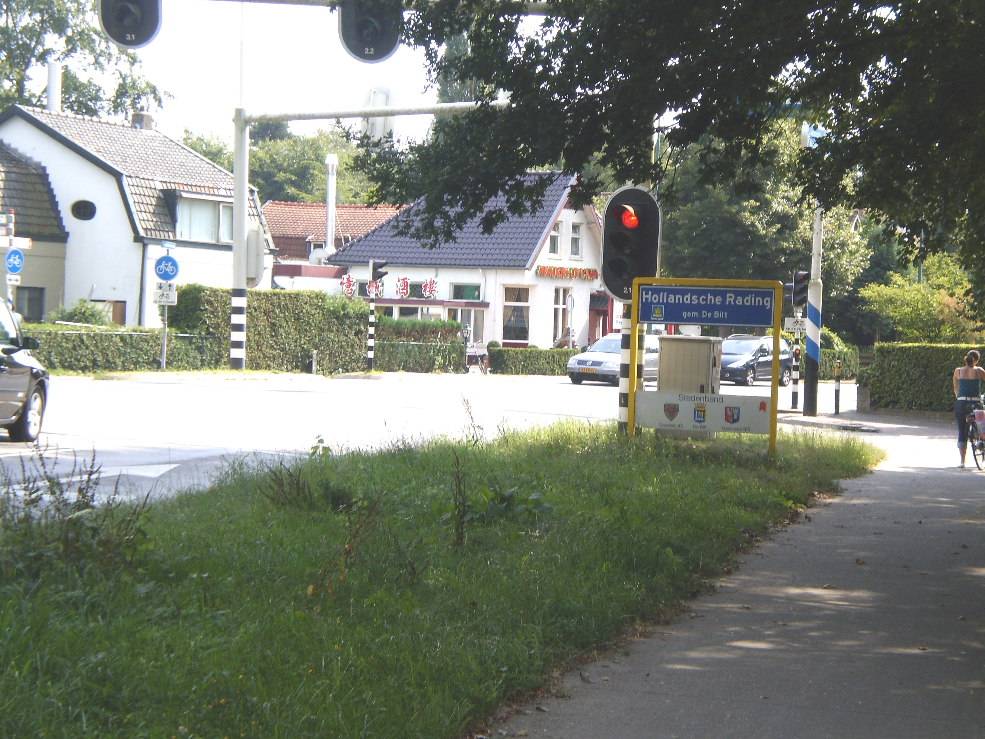 Ofbyld oanbean troch Kees op 19 augustus 2009